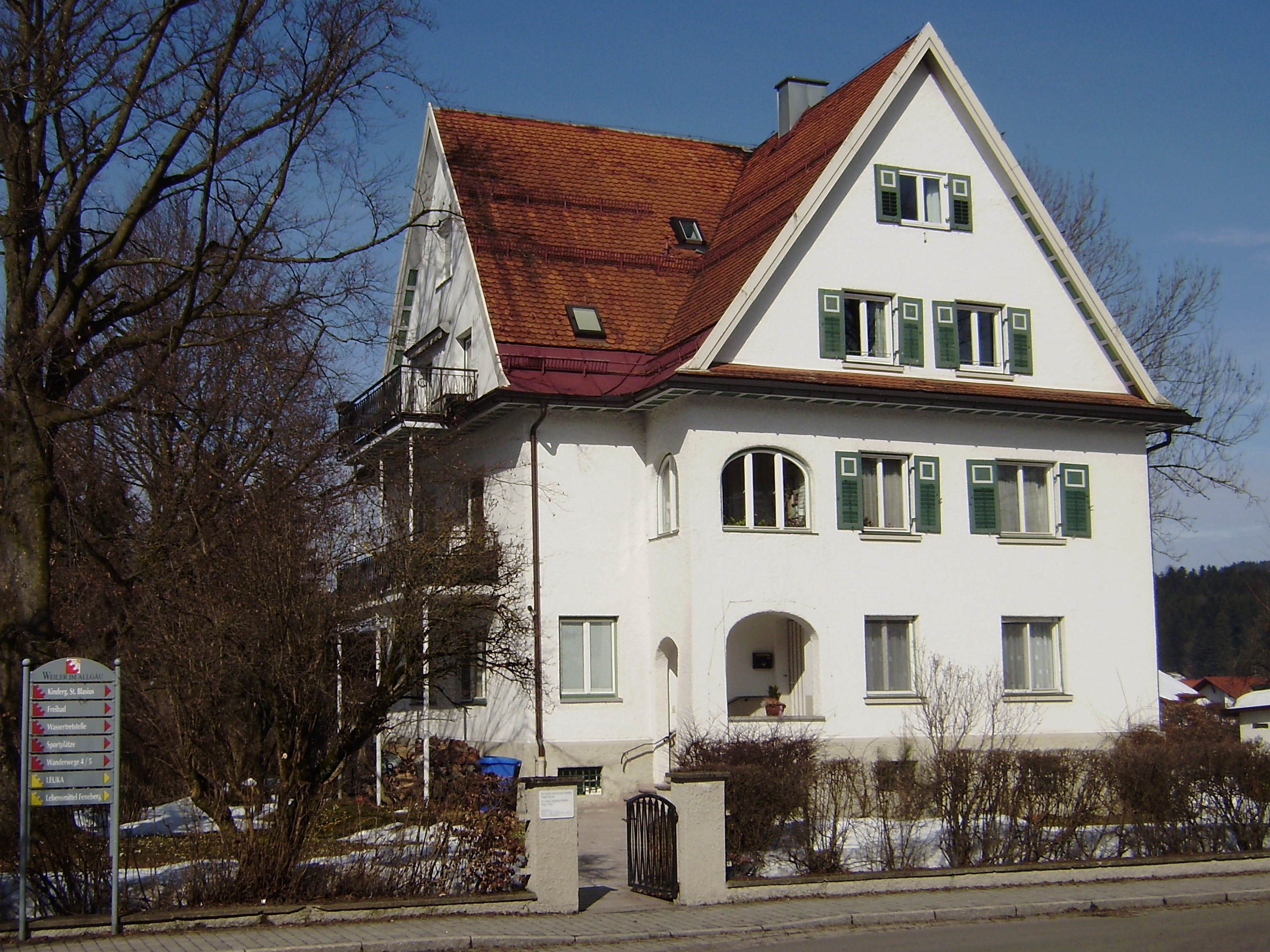 Villa Stromeyer, Kristinusstraße 11, Weiler iA. Errichtet vom Architekten und Baumeister Georg Bufler